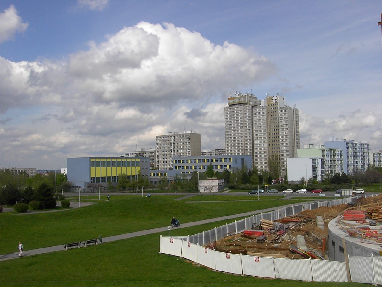 Hotel Kupa a Modrá škola na Hájích.